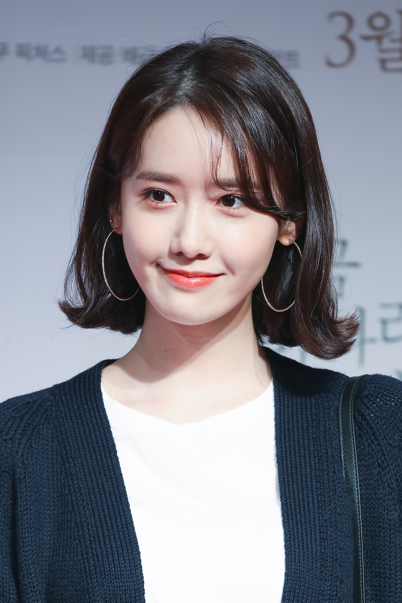 180312 지금 만나러 갑니다 VIP 시사회 윤아 직찍.